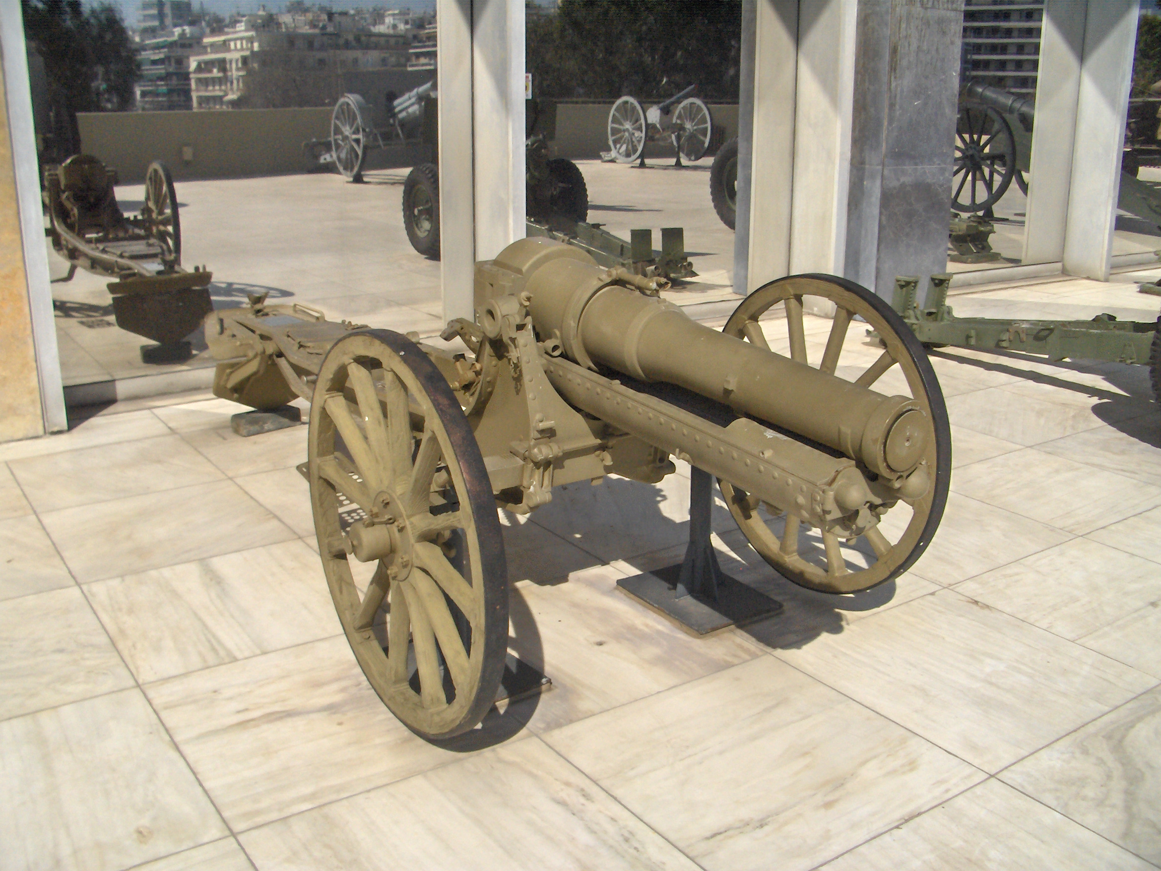 Exhibit at the War Museum in Athens. Schneider 105mm mountain gun